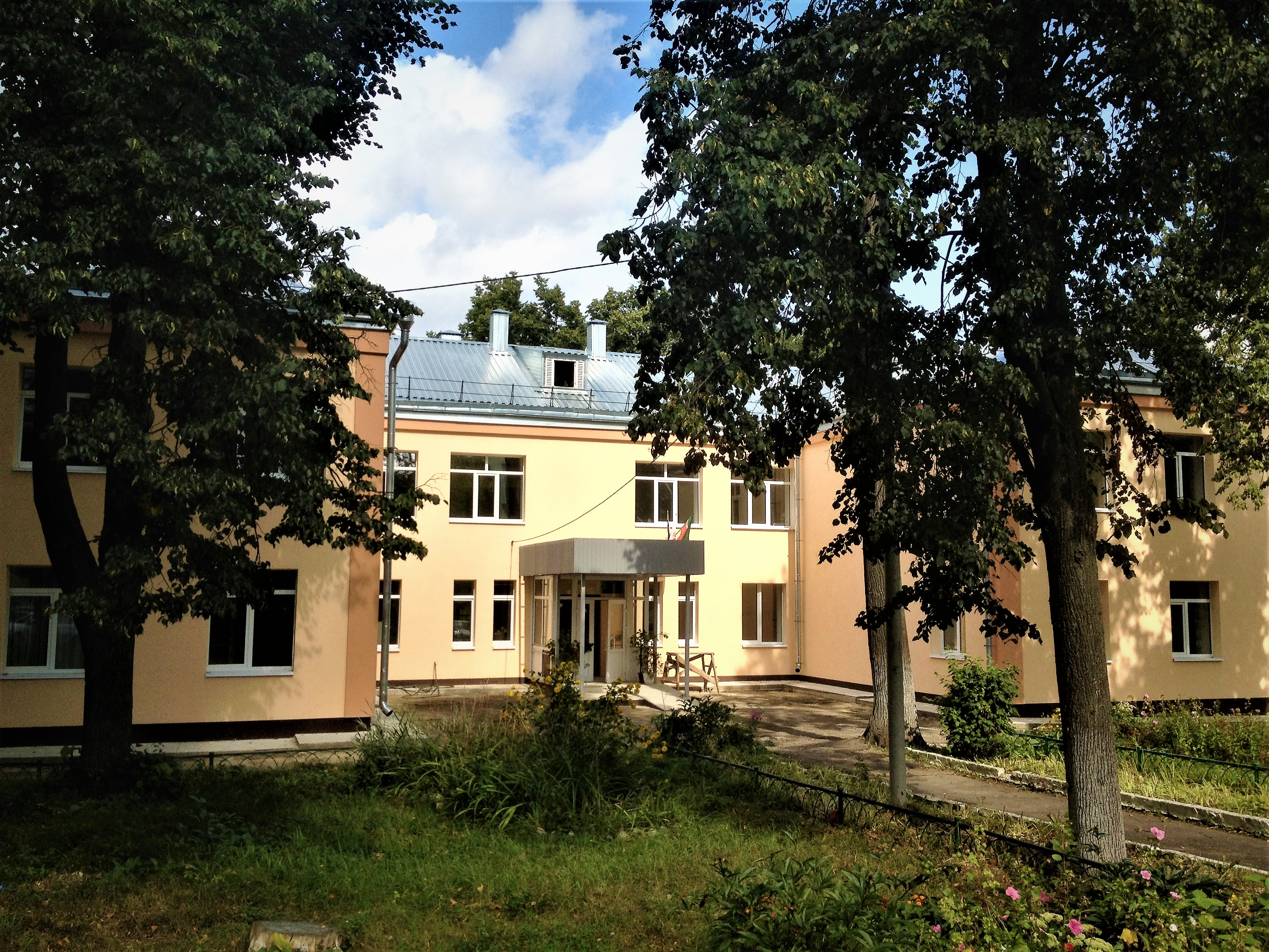 МБОУ «Межшкольный учебный комбинат №1 Авиастроительного района г. Казани» (г. Казань, ул. Олега Кошевого, д. 2 а).